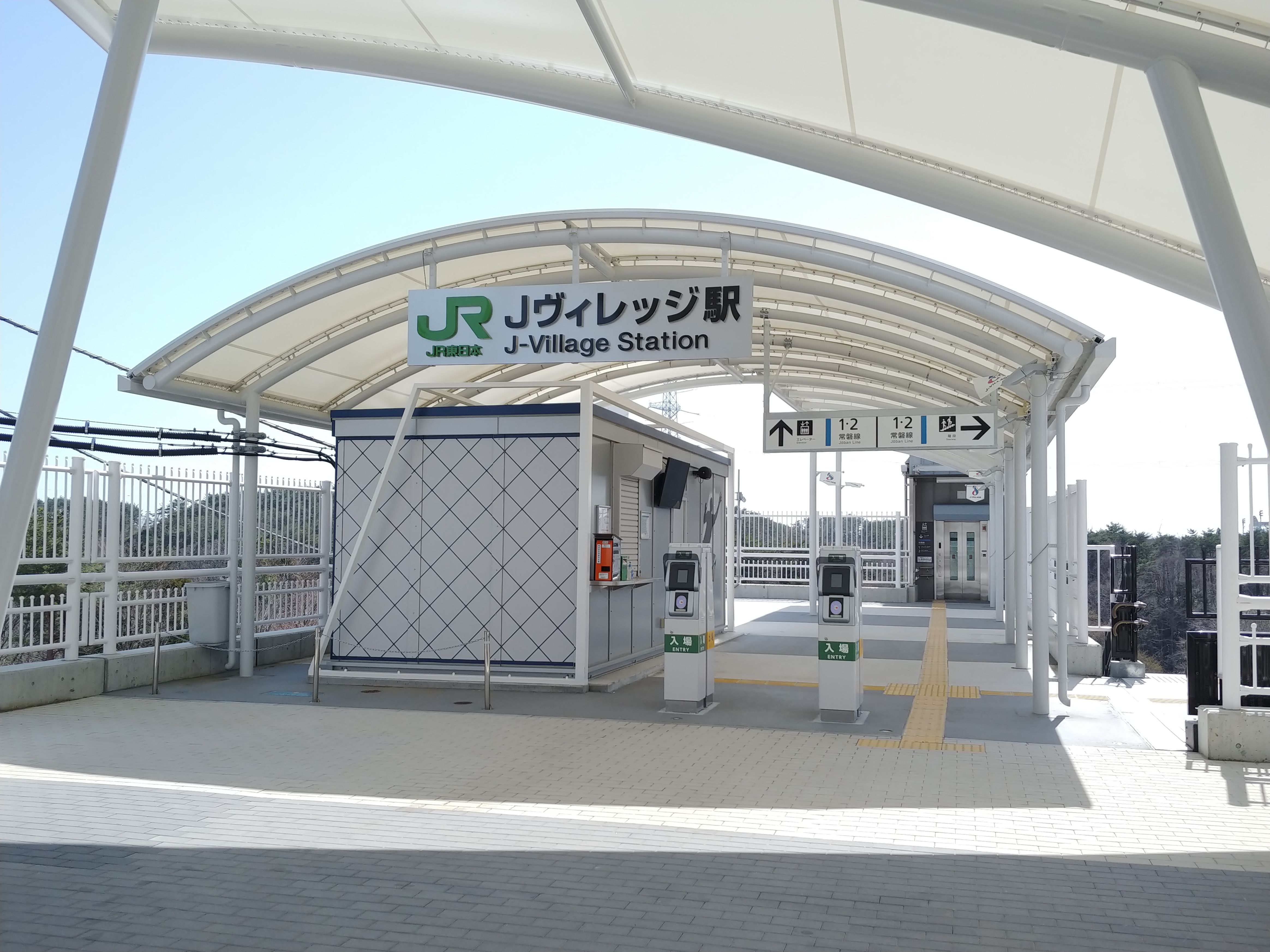 Jヴィレッジ駅の入り口です。